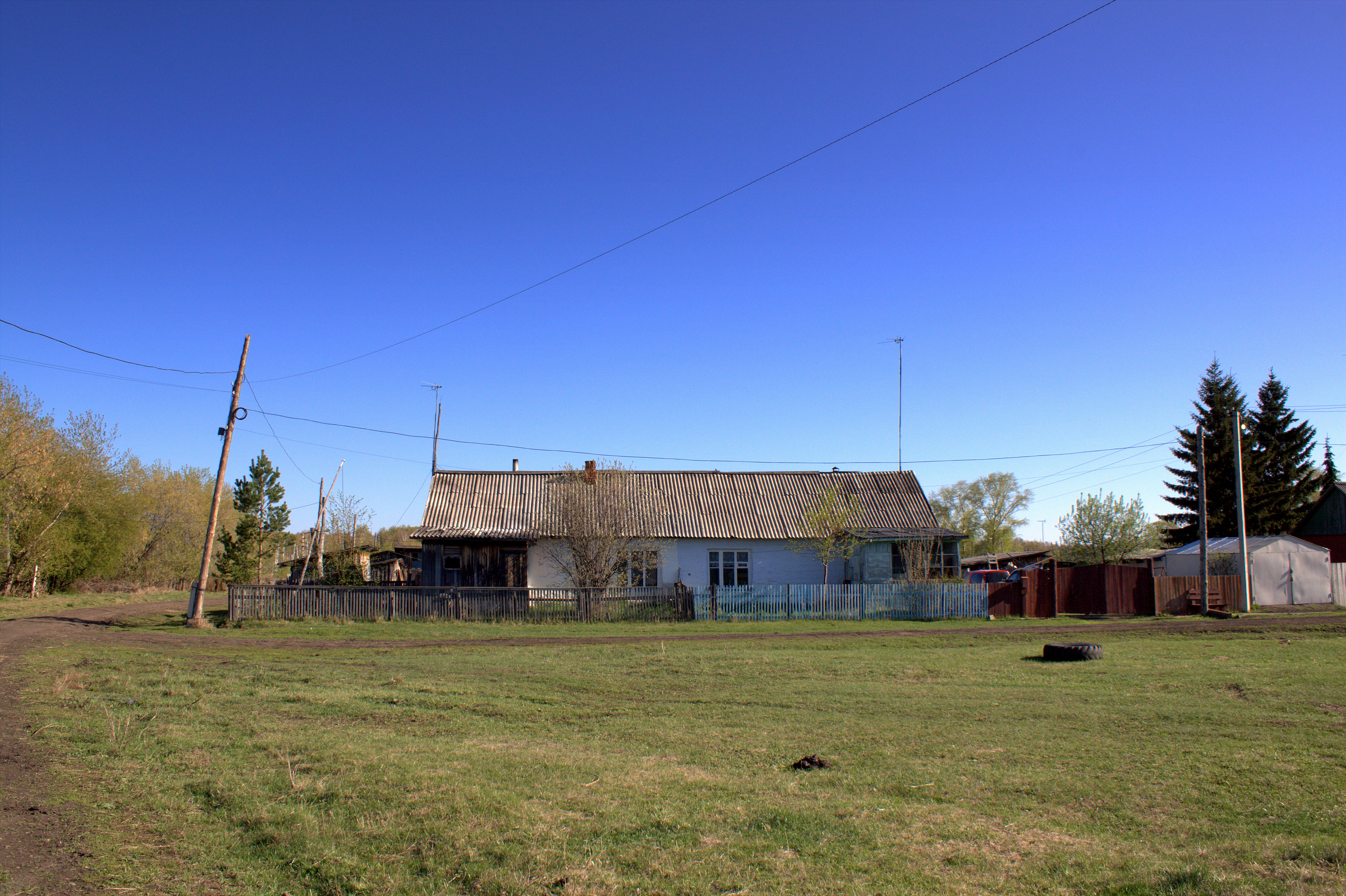 Дом на двух хозяев в поселке Восток Абатского района Тюменской области